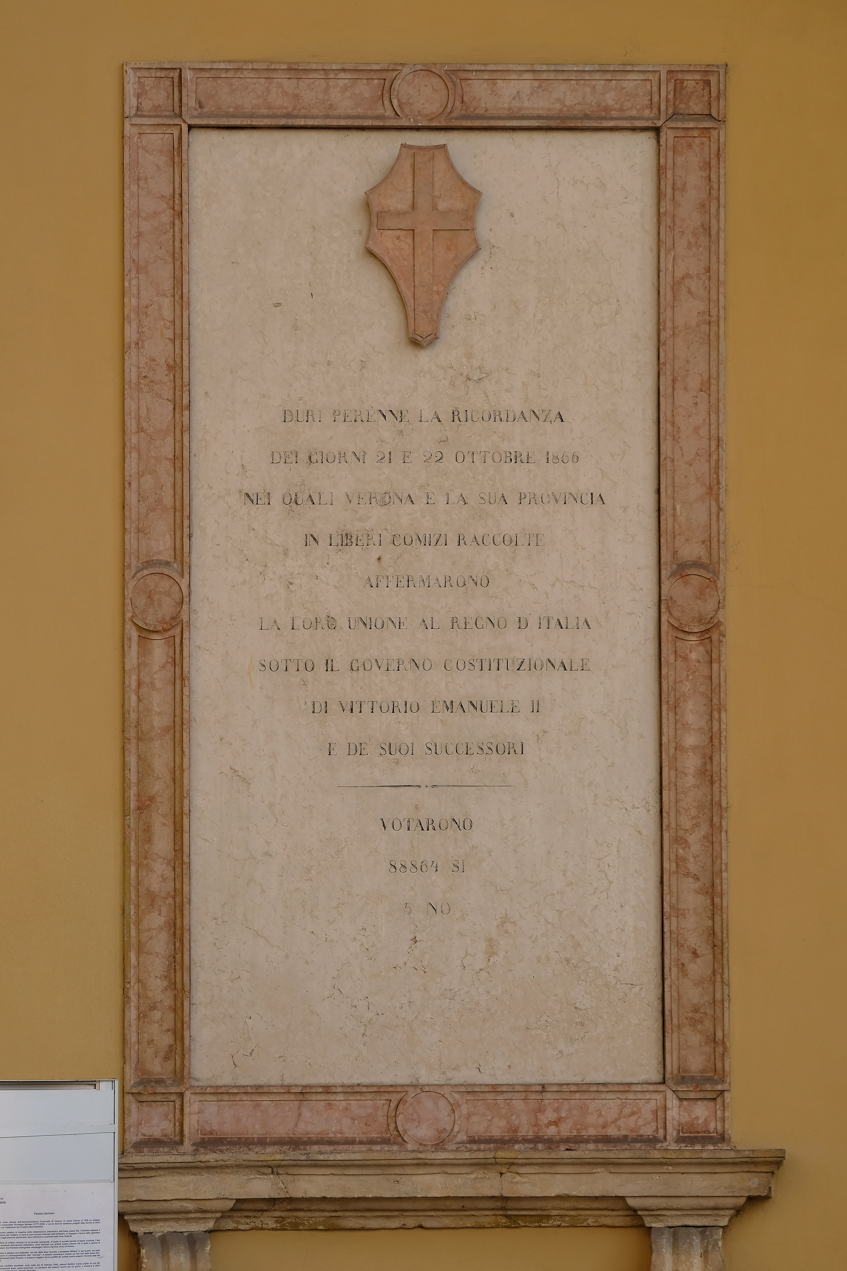 Palazzo Barbieri - Emiciclo ingresso - Lapide del Plebiscito Veneto del 1866 This is a photo of a monument which is part of cultural heritage of Italy.